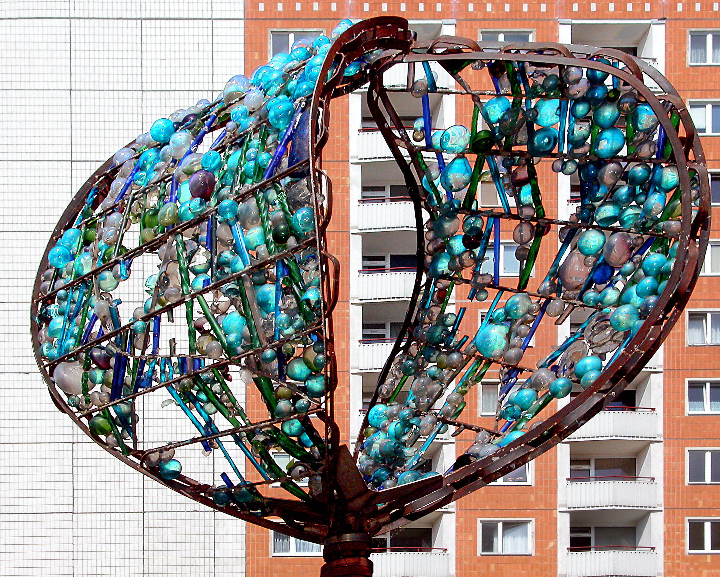 17.05.2009 01239 Dresden-Prohlis. Die Windspiel-Skulptur (Leoni Wirth, 1986) an der Gamigstraße 20 / Jacob-Winter-Platz (GMP: 51.007096,13.795133) im DDR-Plattenbau Neubaugebiet Prohlis. In besseren Tagen bildeten die heute zerschossenen Glaskugeln zwei Segel, die bei Wind die Konstruktion zum Kreiseln brachte. [DSCN37573.TIF]20090517085DR.JPG(c)Blobelt